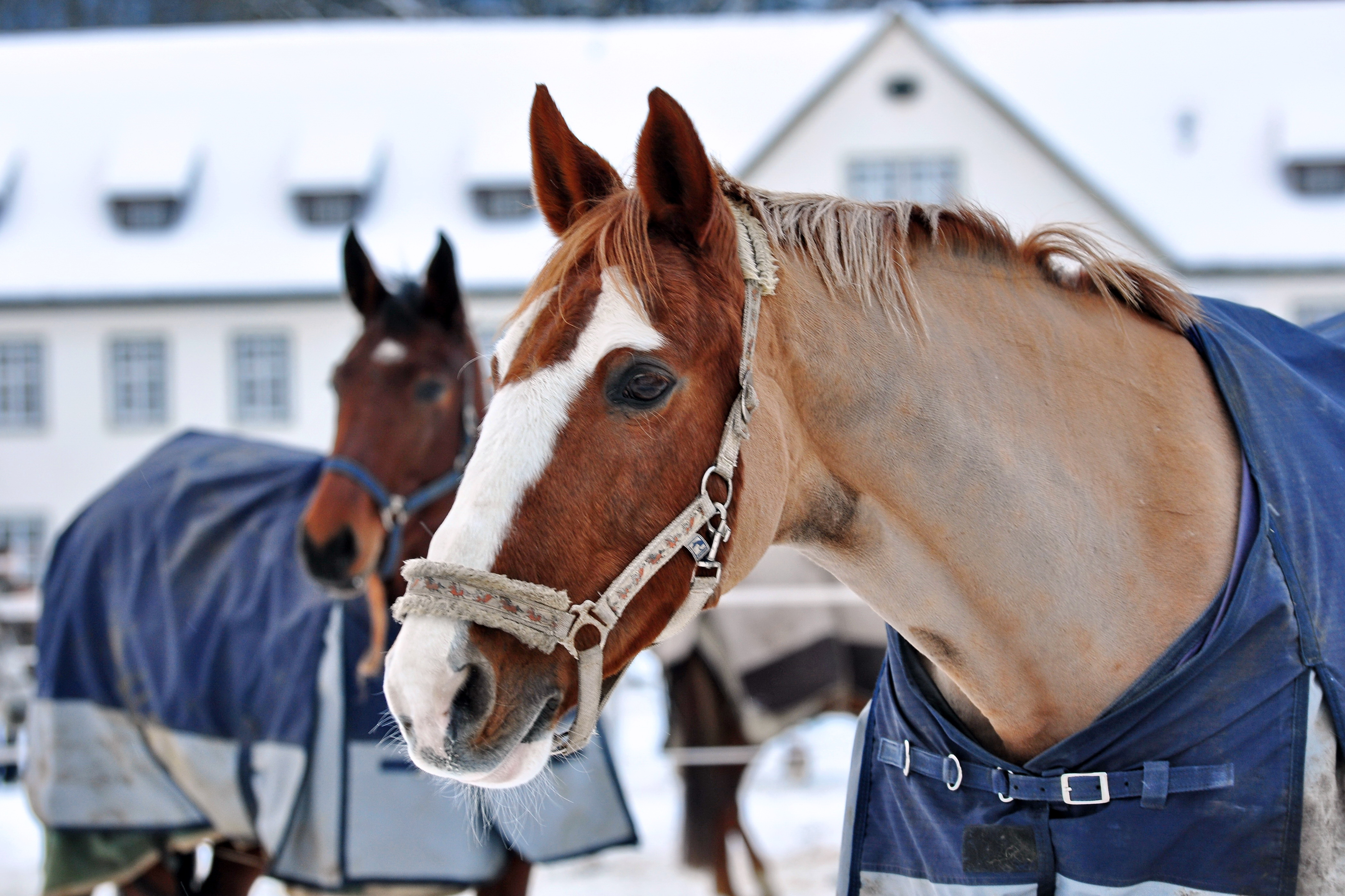 Marstall in Einsiedeln (Switzerland)